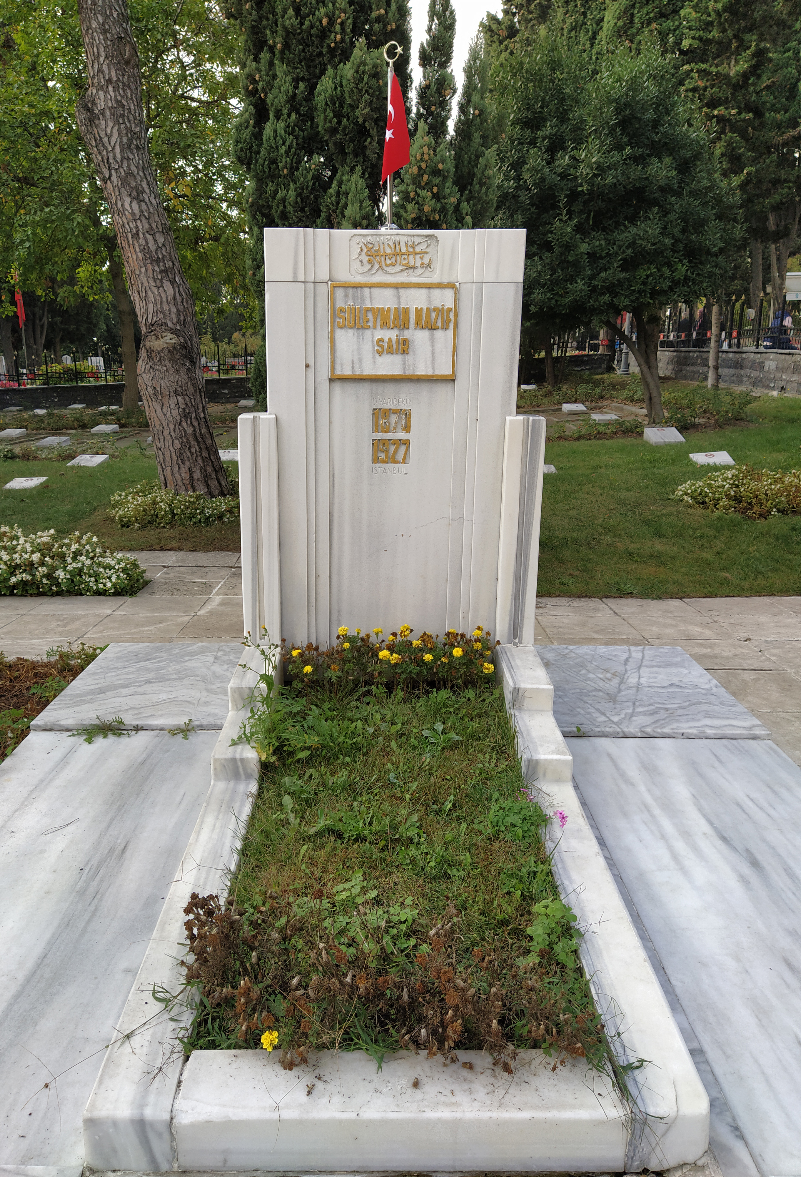 Süleyman Nazif'in Edirnekapı Şehitliği'nde bulunan kabri